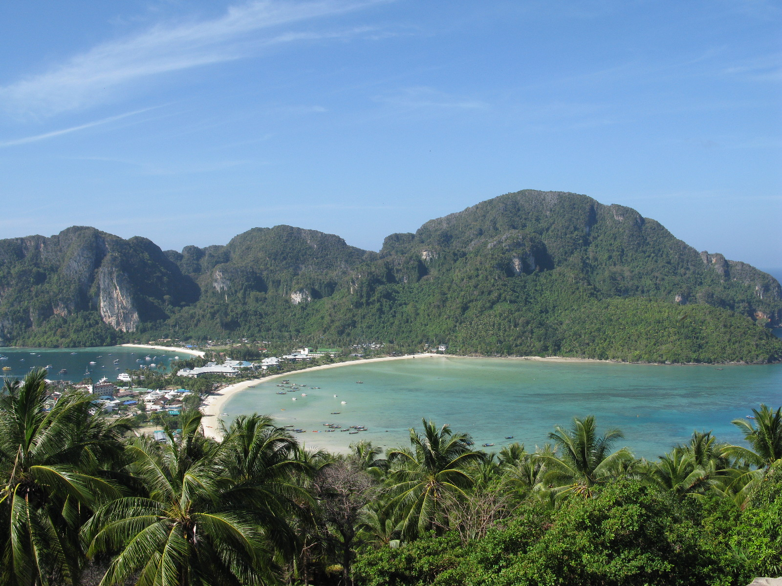 Koh Phi Phi viewpoint